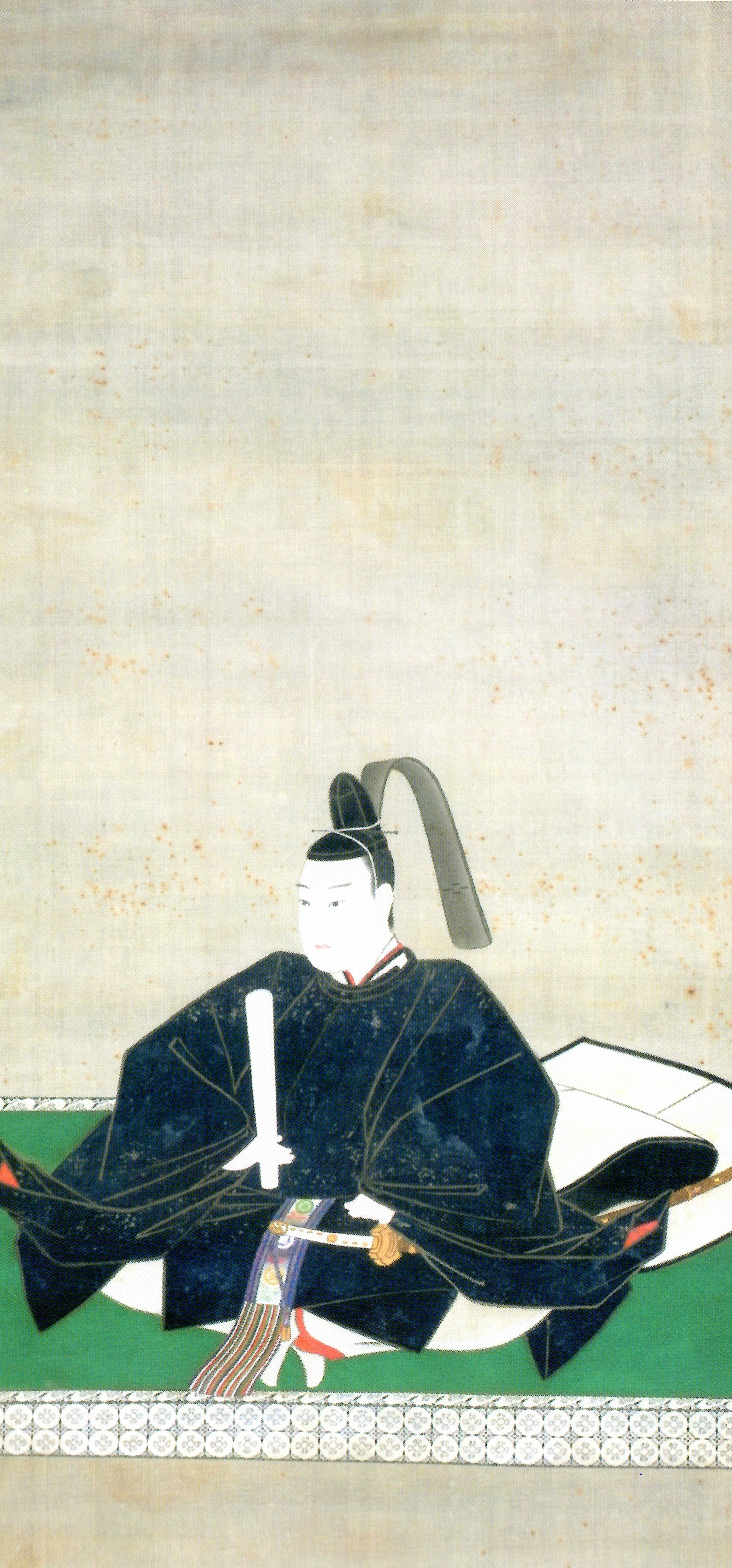 阿部正精の肖像。